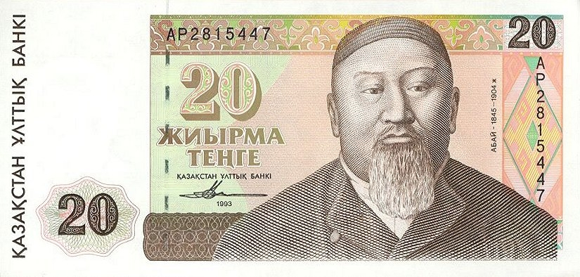 20 тенге 1993 года